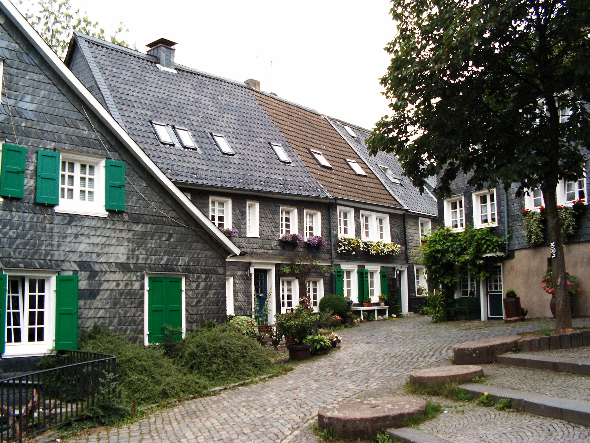 Häuser am Gräfrather Markt / an der Kirchtreppe